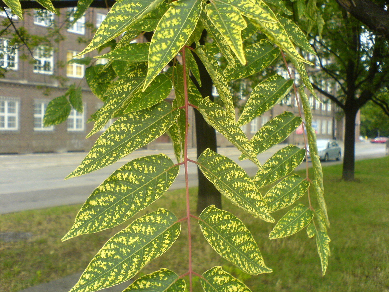 Ailathus altissima 'Aucubaefolia' / Polska / Wrocław